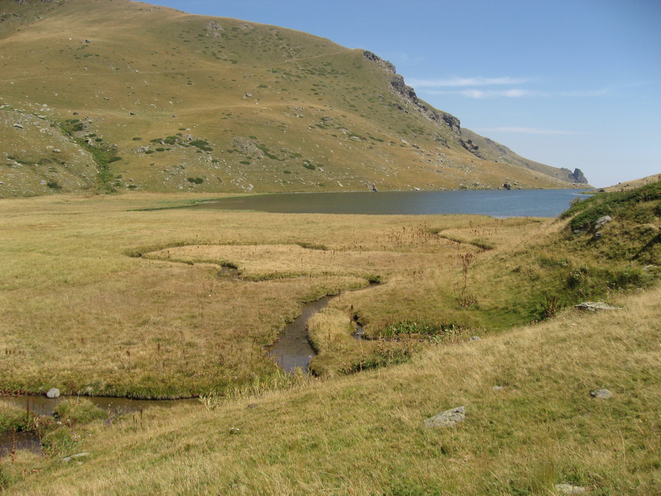 Боговинската река се влева во Боговињското езеро на Шар Планина